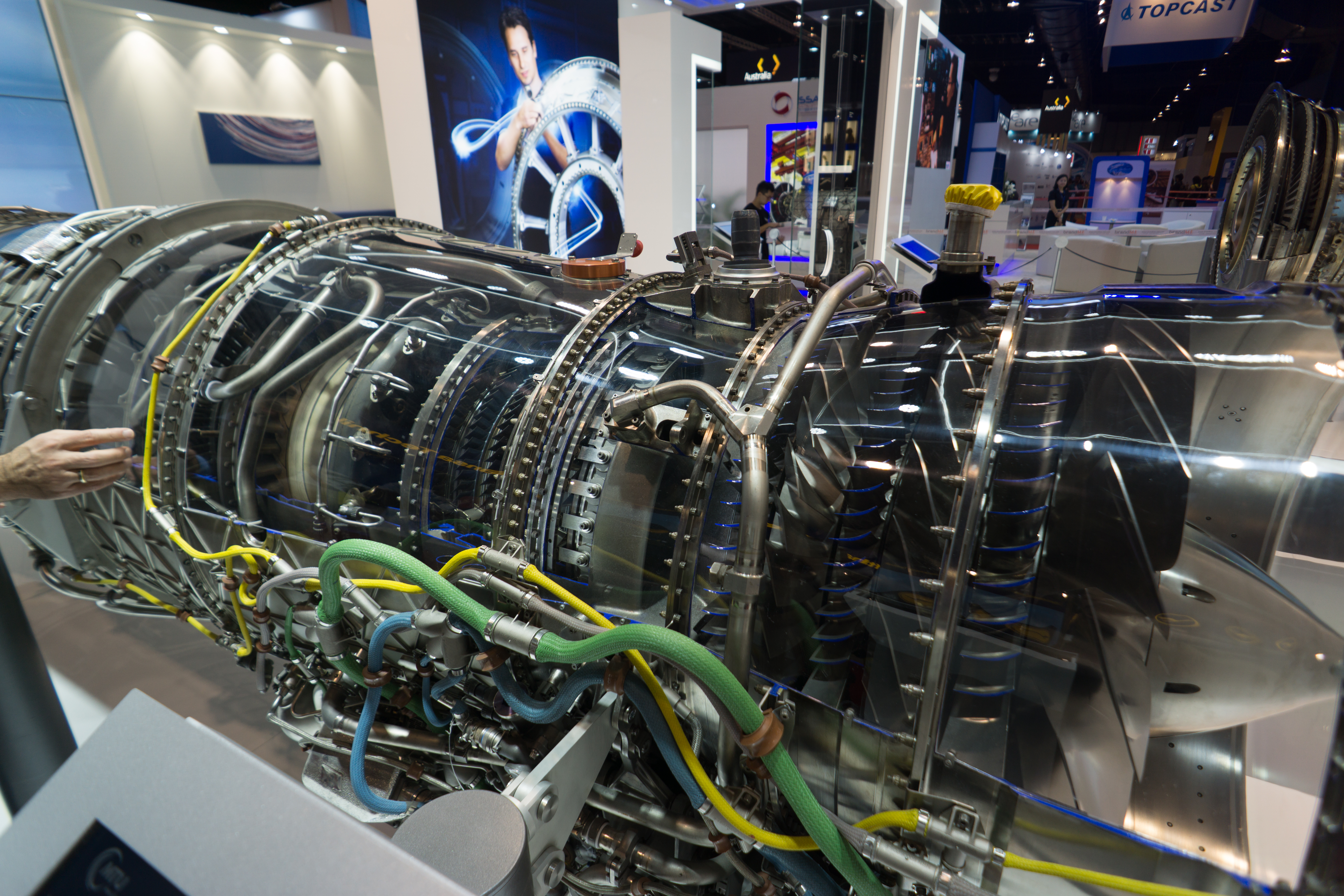 Eurojet EJ200